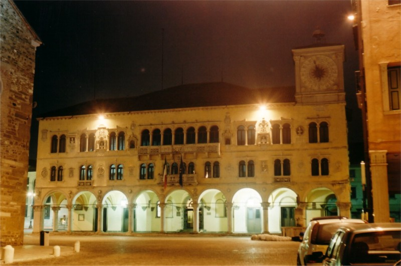 Immagine notturna del Palazzo dei Rettori (Belluno)